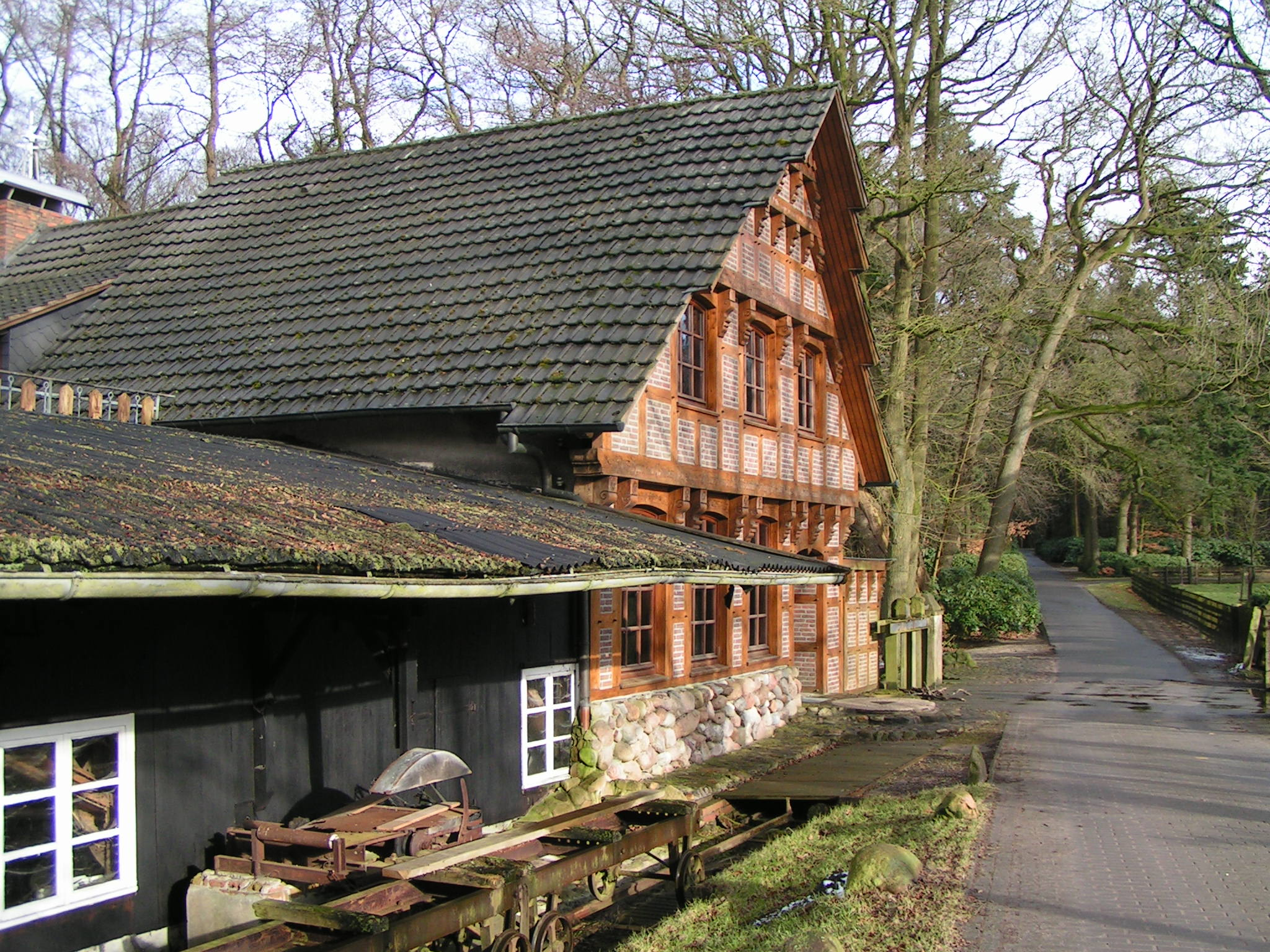 Kokenmühle im Naturschutzgebiet "Bäken der Endeler und Holzhauser Heide" bei Endel (Gemeinde Visbek, Landkreis Vechta, Niedersachsen)